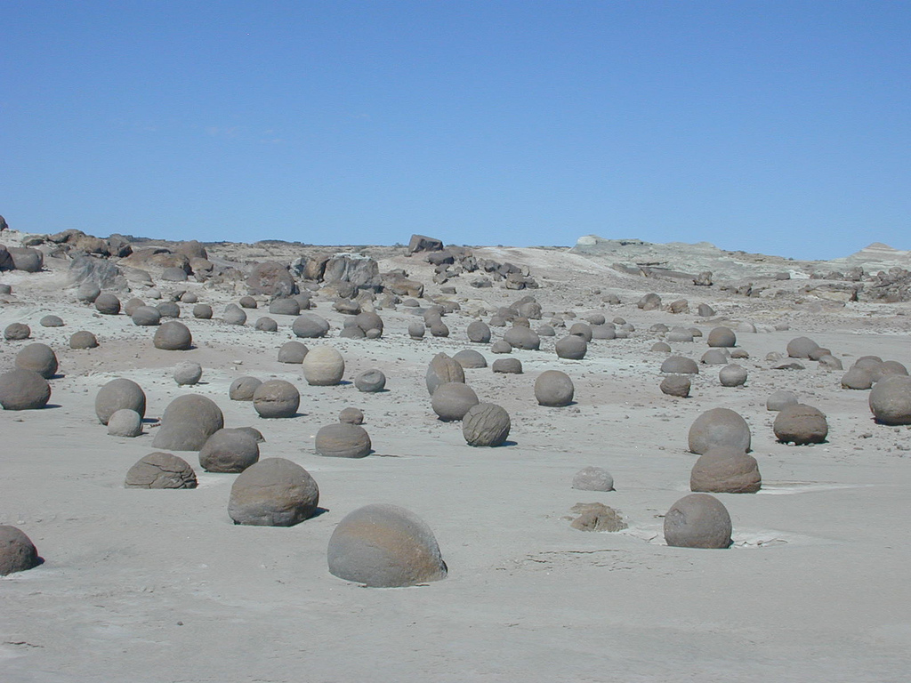 las piedras emergen por la erosion, son fósiles de alguna clase de materia orgánica